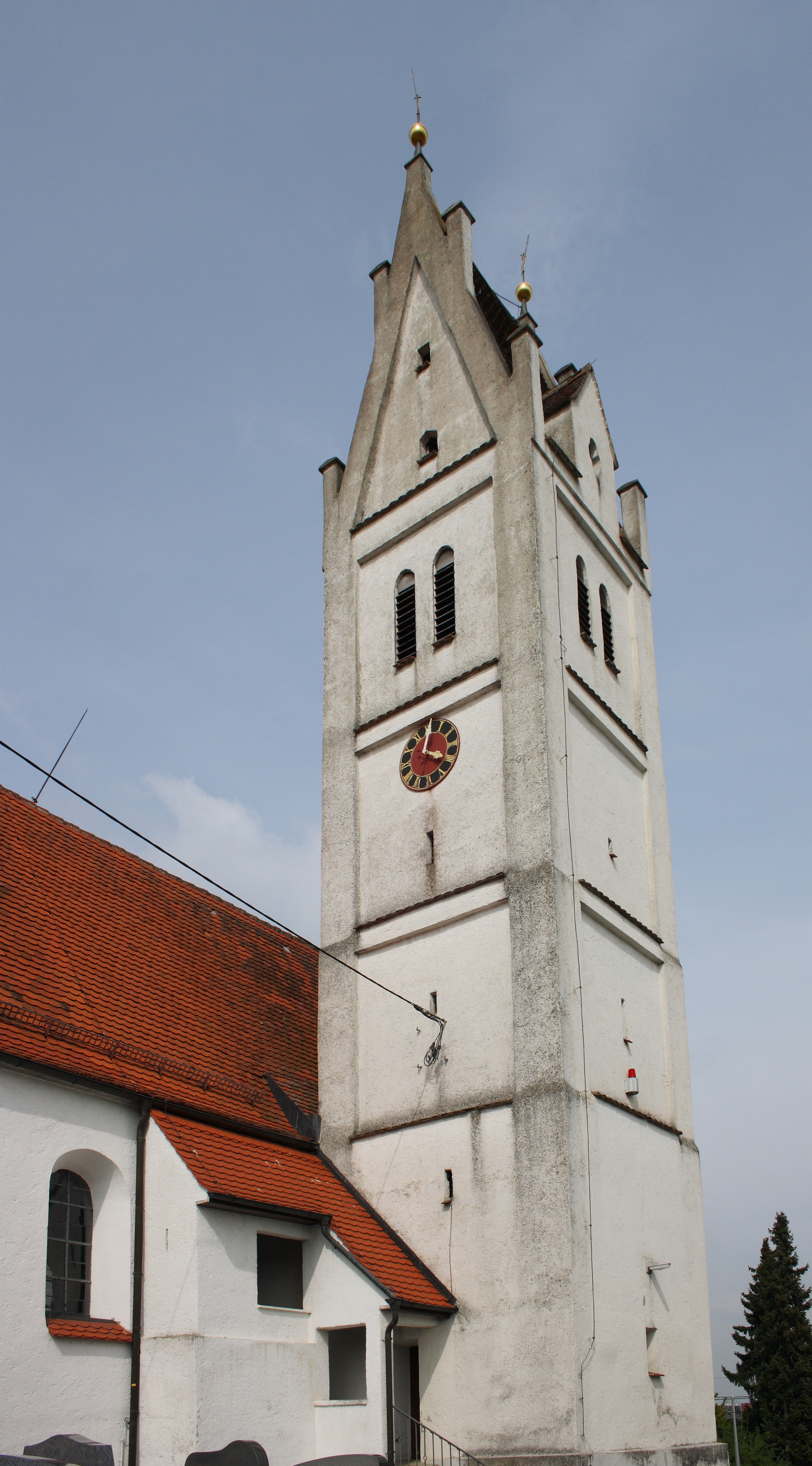 Katholische Pfarrkirche St. Peter und Paul in Gründenbaindt, einem Ortsteil von Dinkelscherben im Landkreis Augsburg (Bayern), Turm